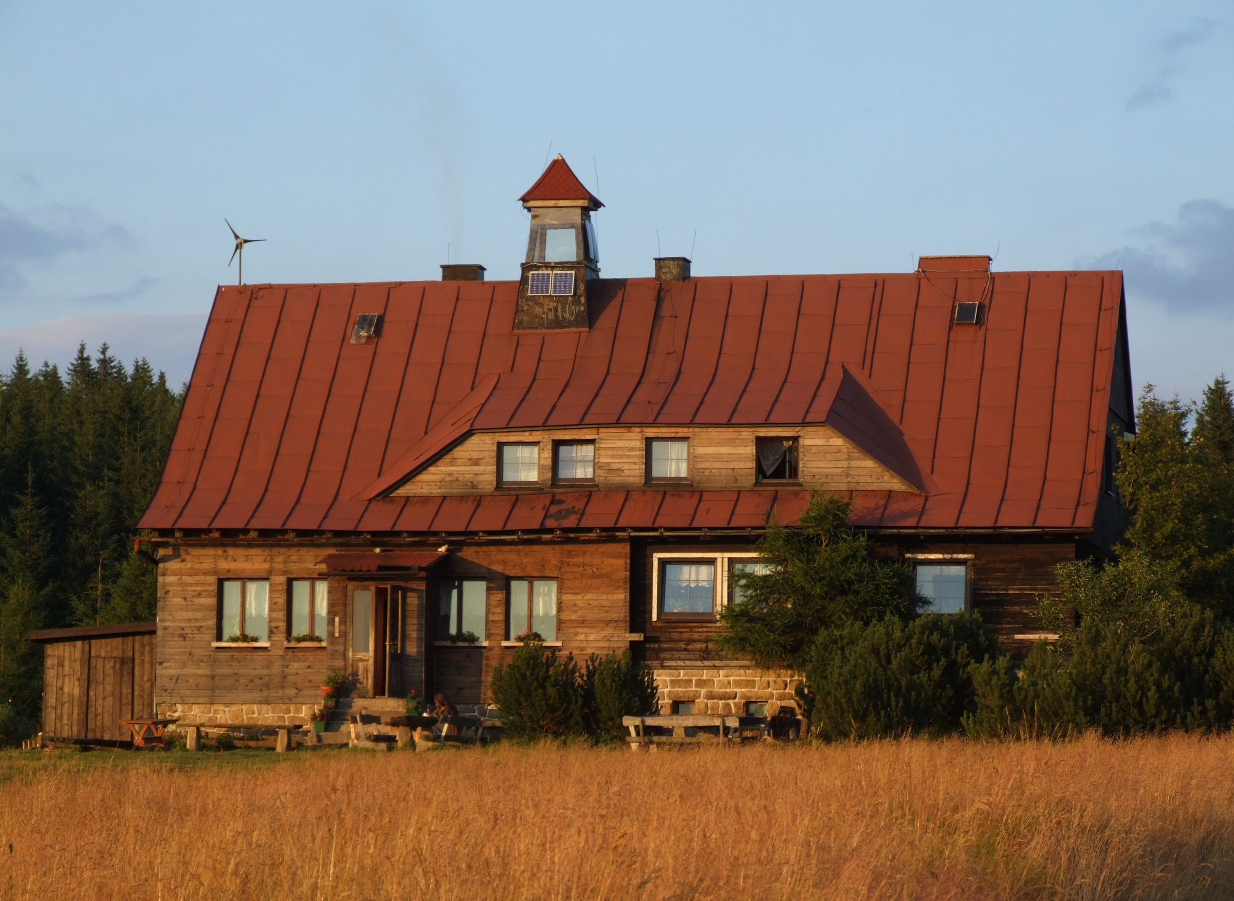 Chatka Górzystów o zachodzie słońca